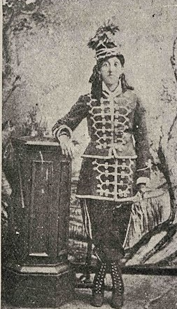 Juana López (1845-1907), cantinera del Ejército de Chile en la Guerra del Pacífico. Fotografía sin fecha.